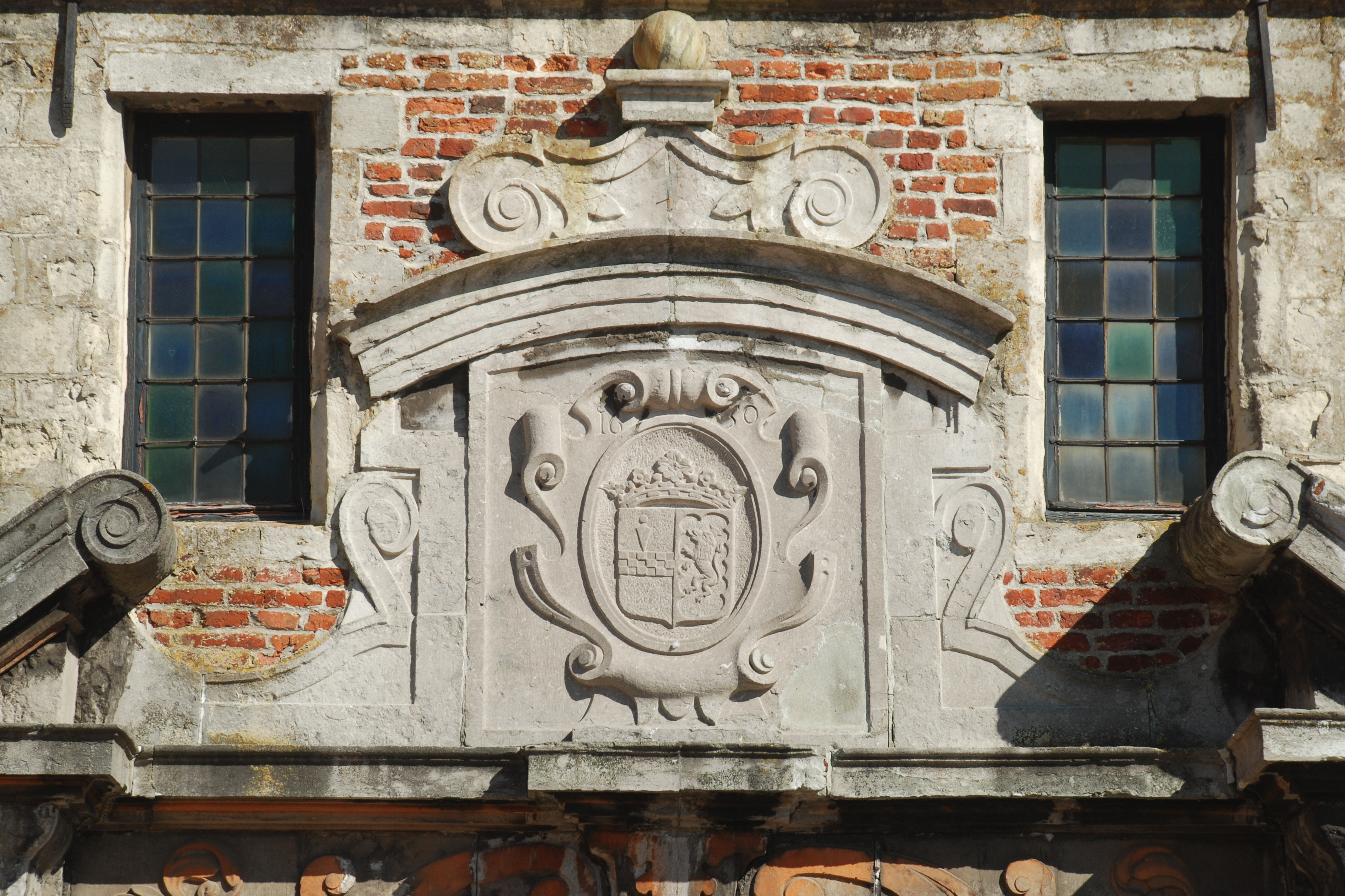 Belgique - Brabant wallon - Château de Rixensart - Portail central - Blason